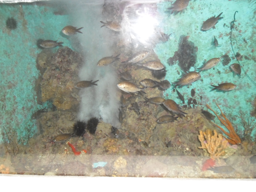 prizor iz dubrovačkog akvarija